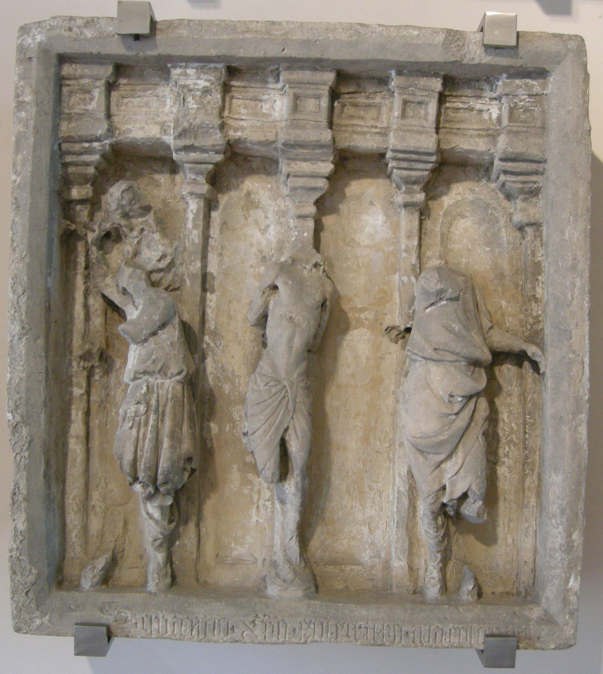 Scultore abruzzese della prima metà del XV sec., da casteldisangro, flagellazione